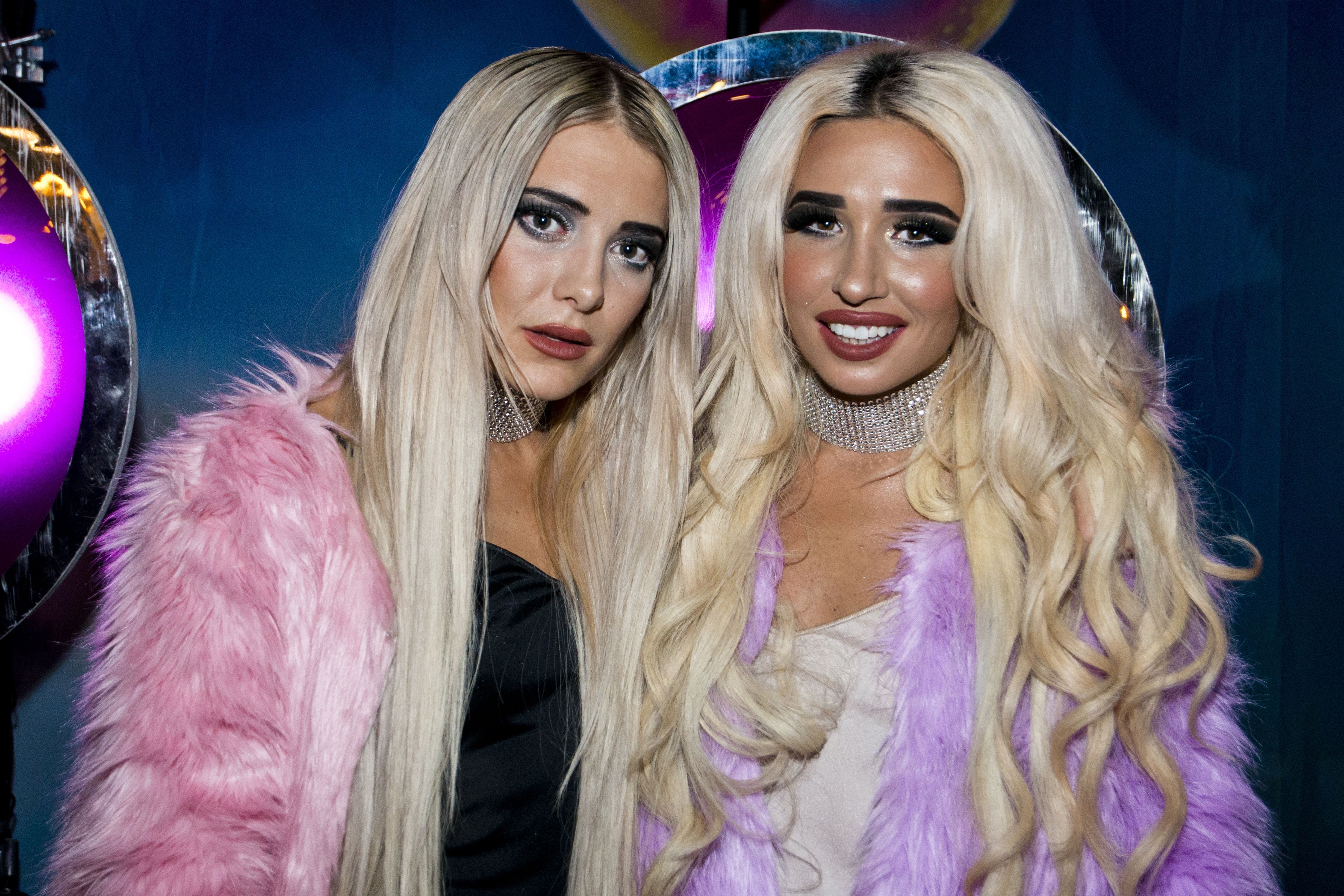 Rebecca och Fiona på Sommarkrysset, Gröna Lund